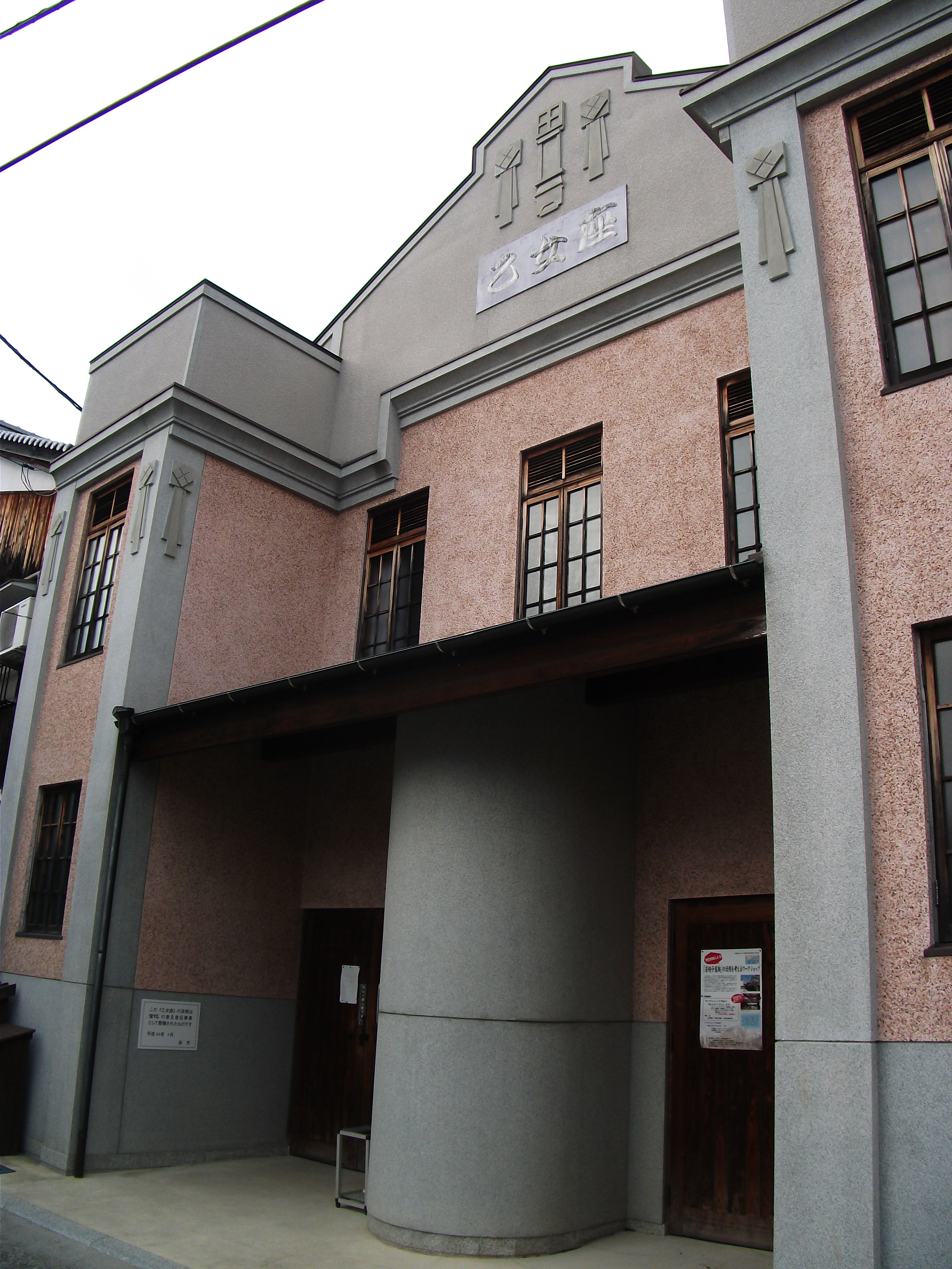 広島県呉市大崎下島の御手洗地区にある劇場、乙女座。建物外観。